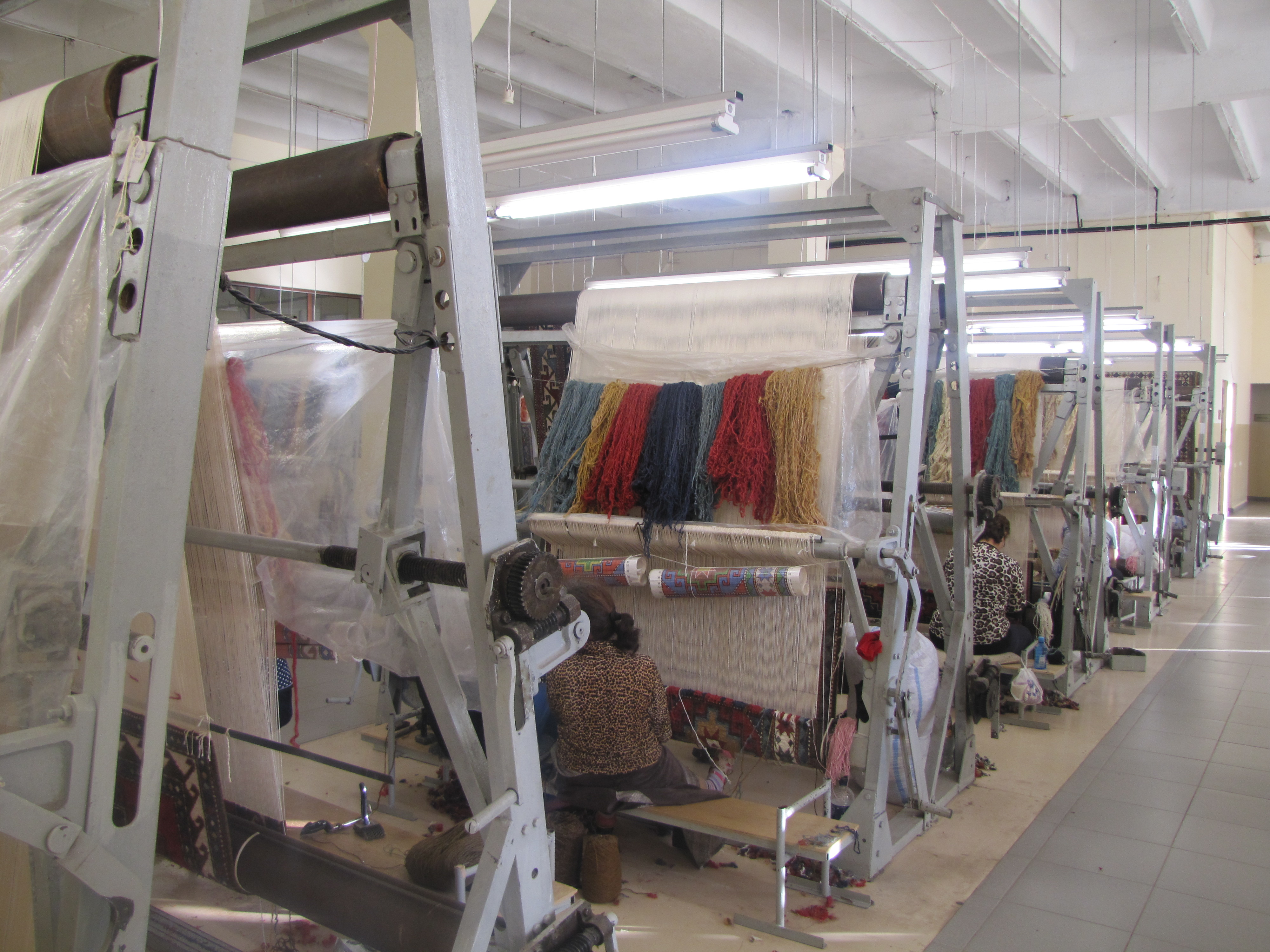 Ղարաբաղ Կարպետ